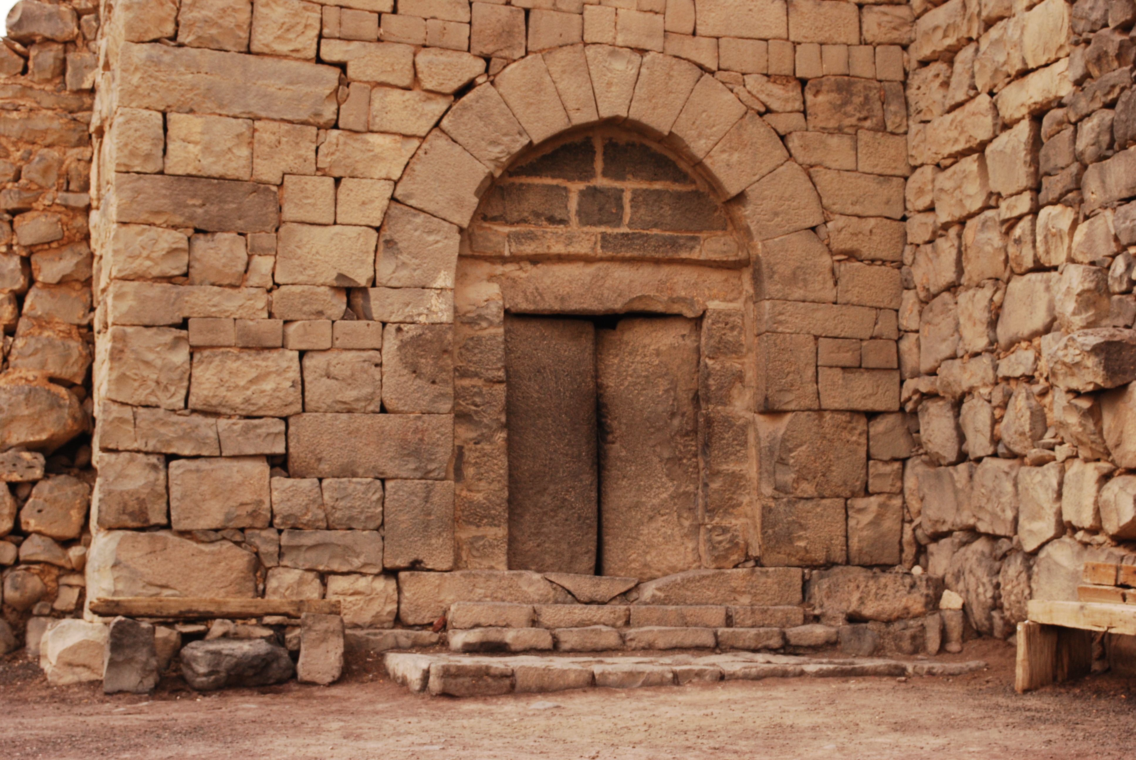 Qasr al Azrak : porte en pierre du portail d'accès.